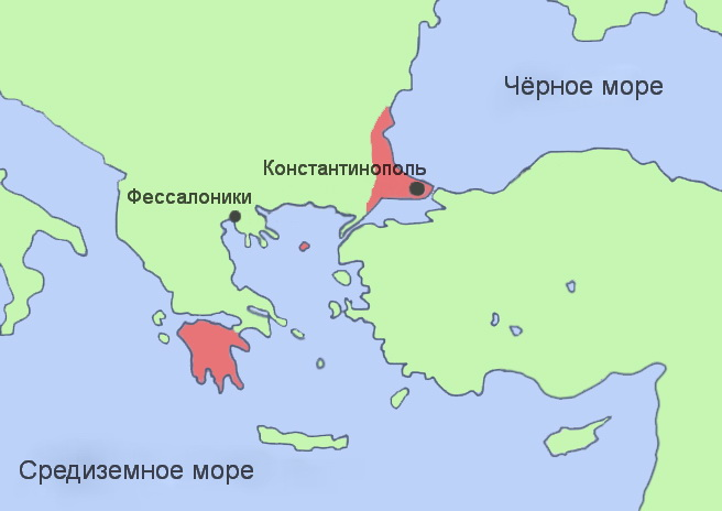 Russian version of Image:Impero bizantino nella metà del XV secolo.jpg